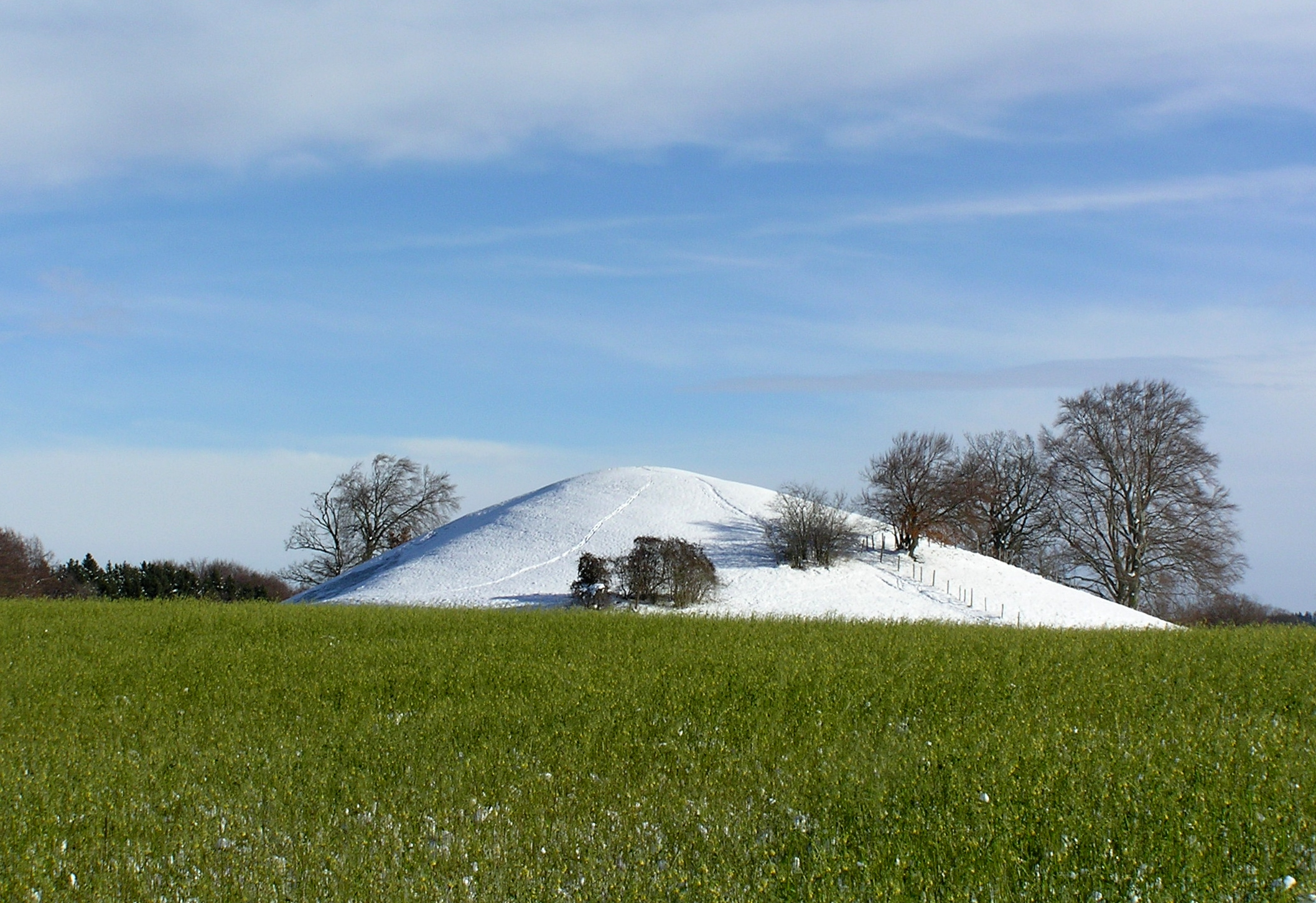 Andechs, Naturdenkmal Bäckerbichl, ein Drumlin auf Erlinger Flur.